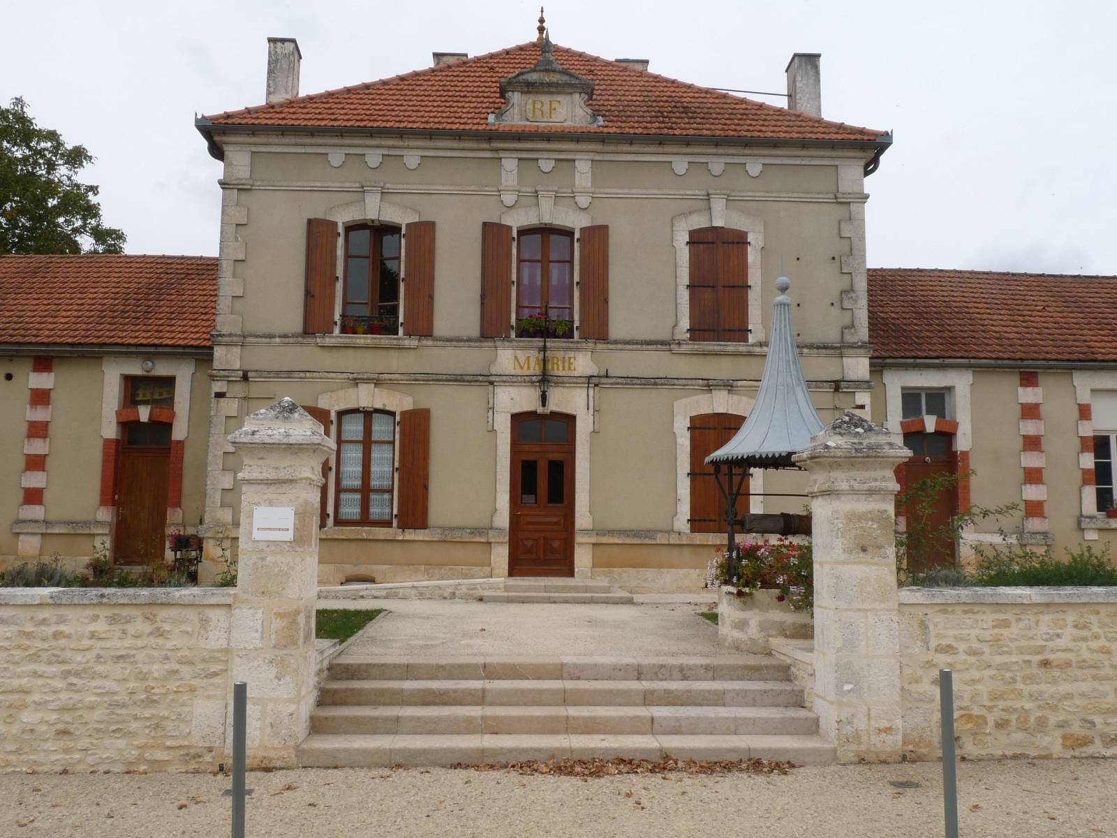 mairie des Adjots, Charente, France